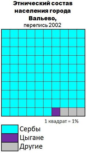 Этнический состав населения города Вальево (Сербия)